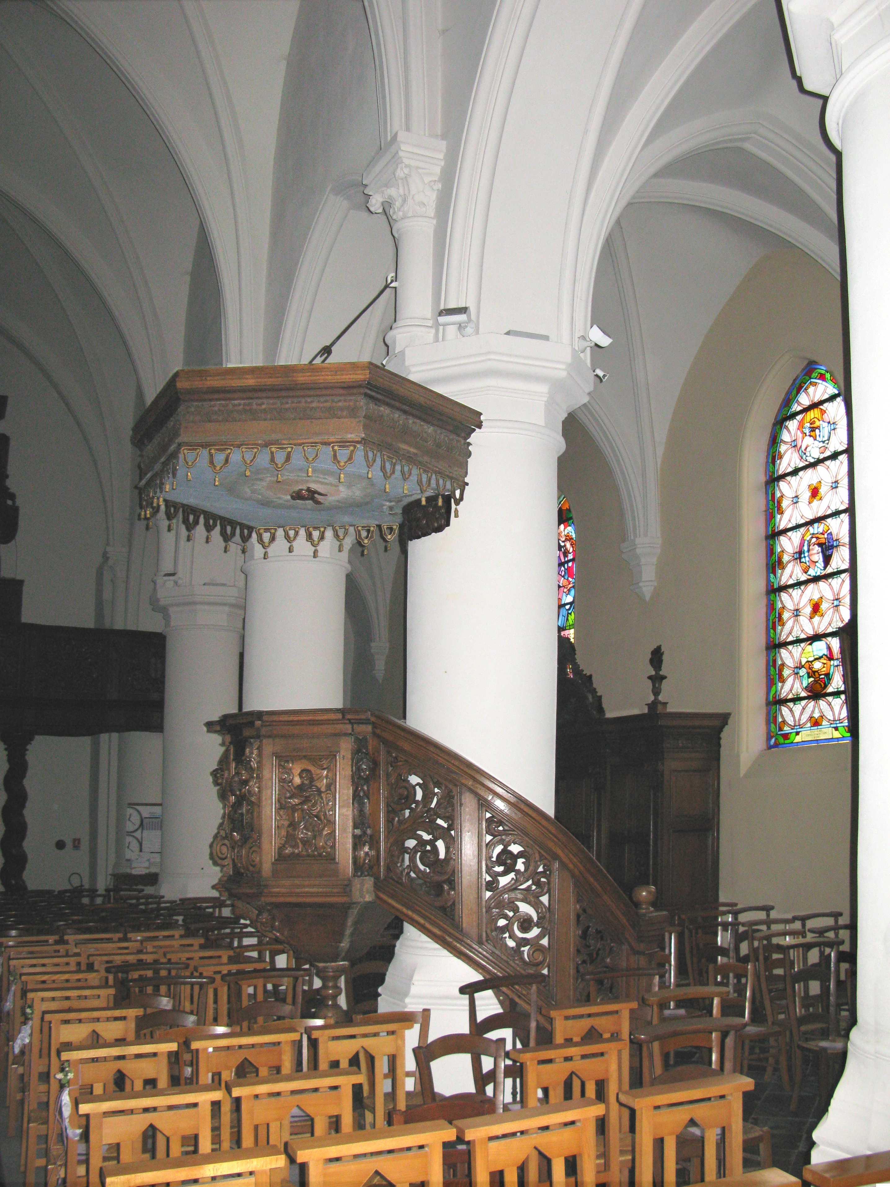 Eglise Saint-Omer de Brouckerque, chaire en bois sculpté.